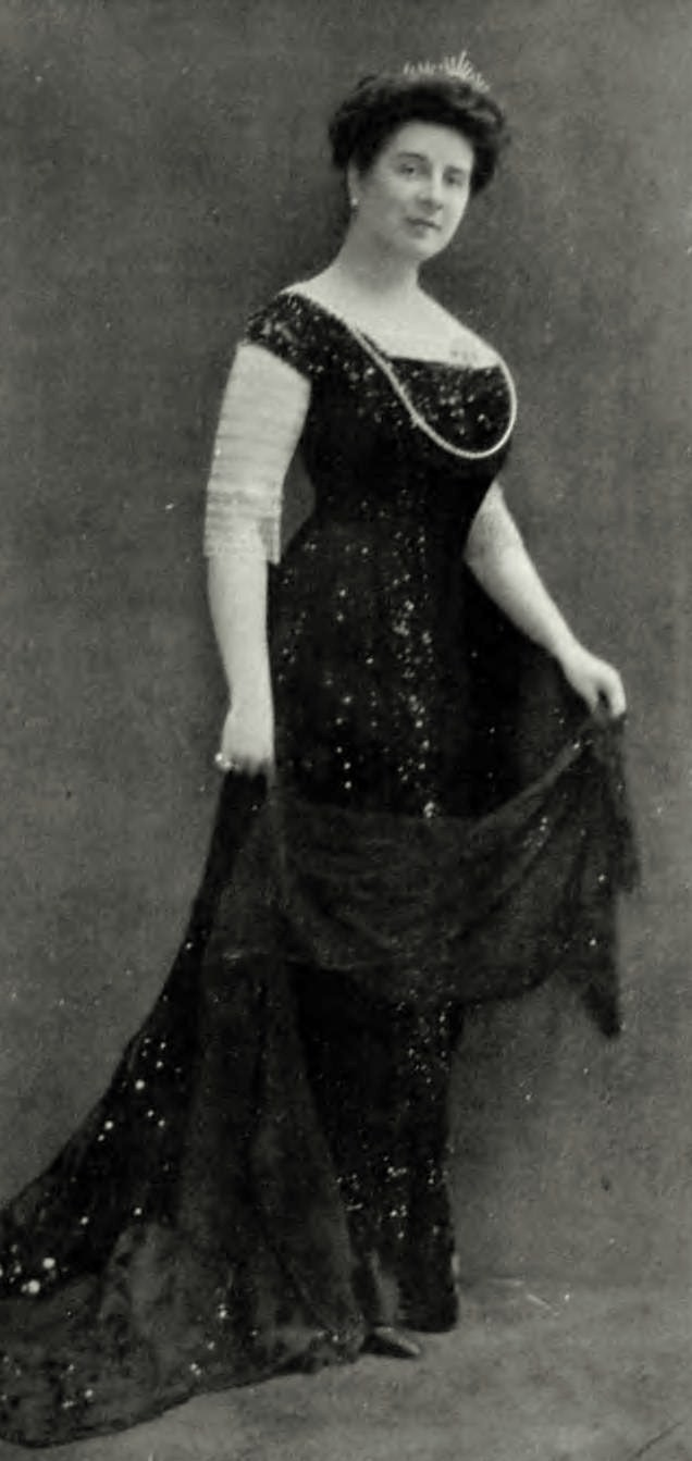 Погуляева Надежда Александровна, урожденная Ветшанина